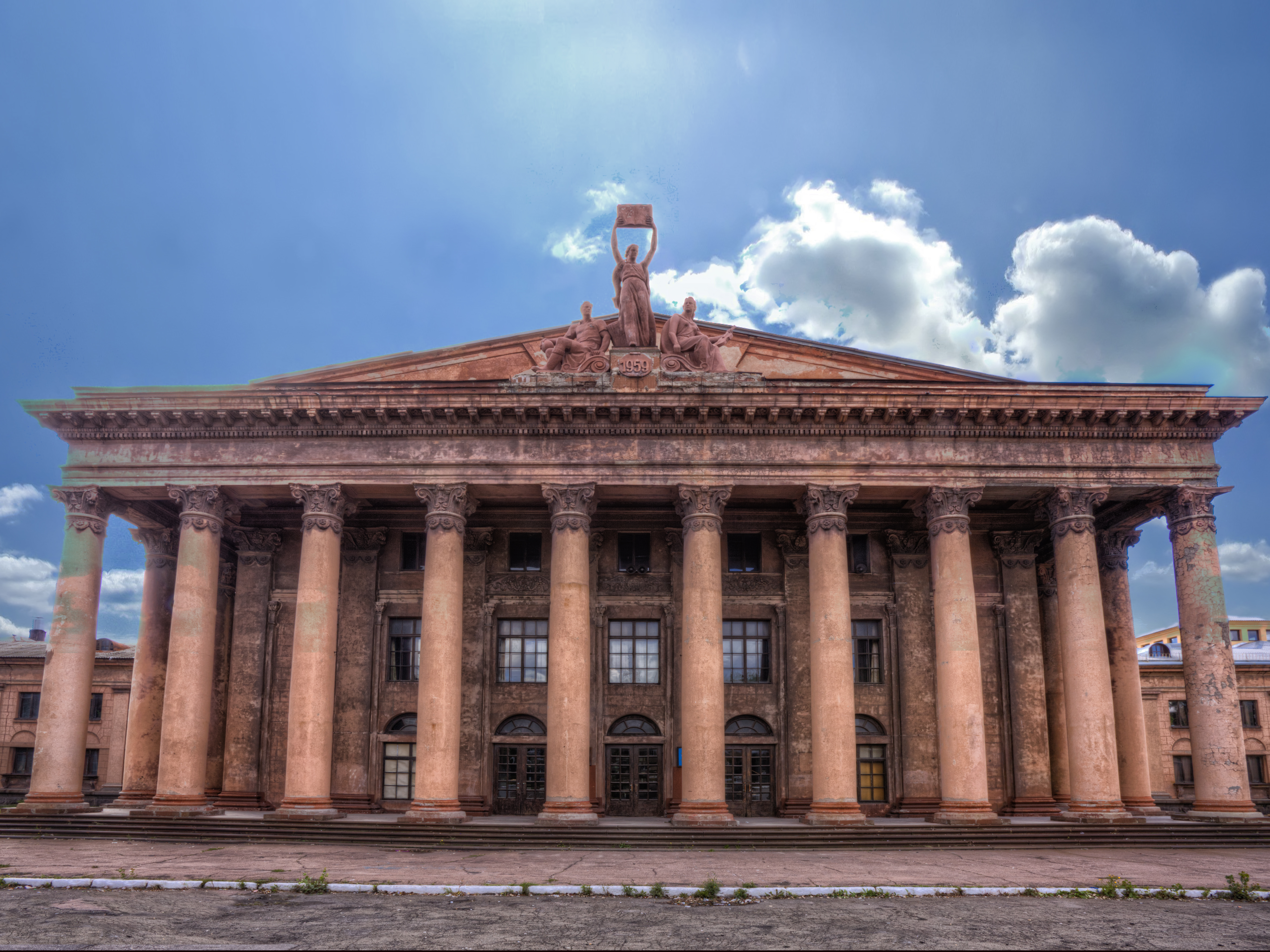 Палац культури металургійного заводу, Макіївка, вул.Кірова,73